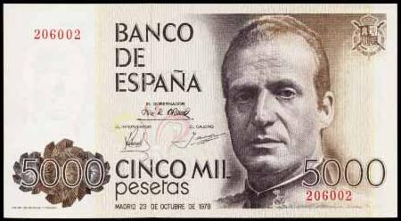 5000 pesetas del 79.